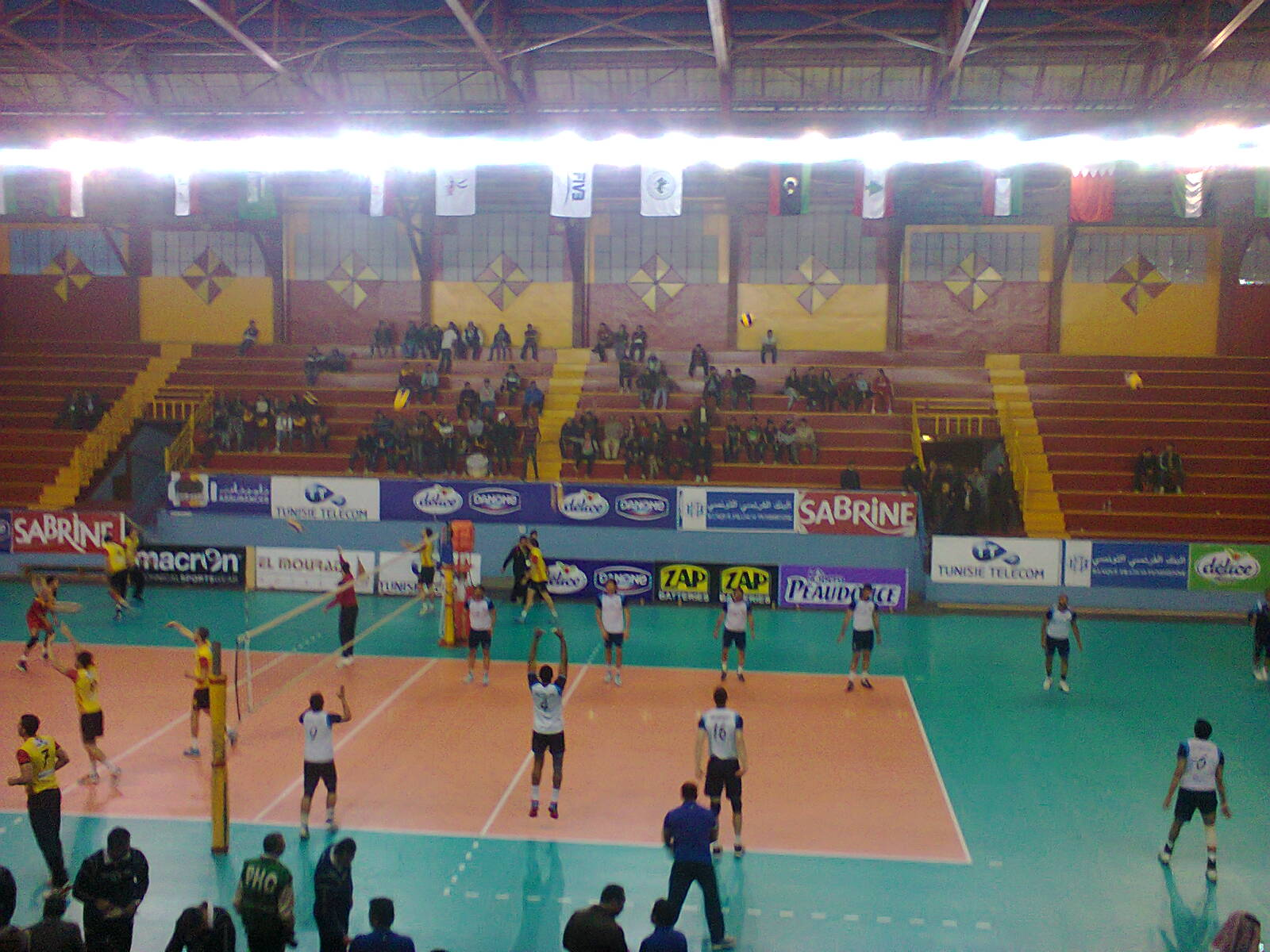 Salle Mohamed Zouaoui lors du match EST - Bani Yas SC en Championnat arabe des clubs de volley-ball (2014)